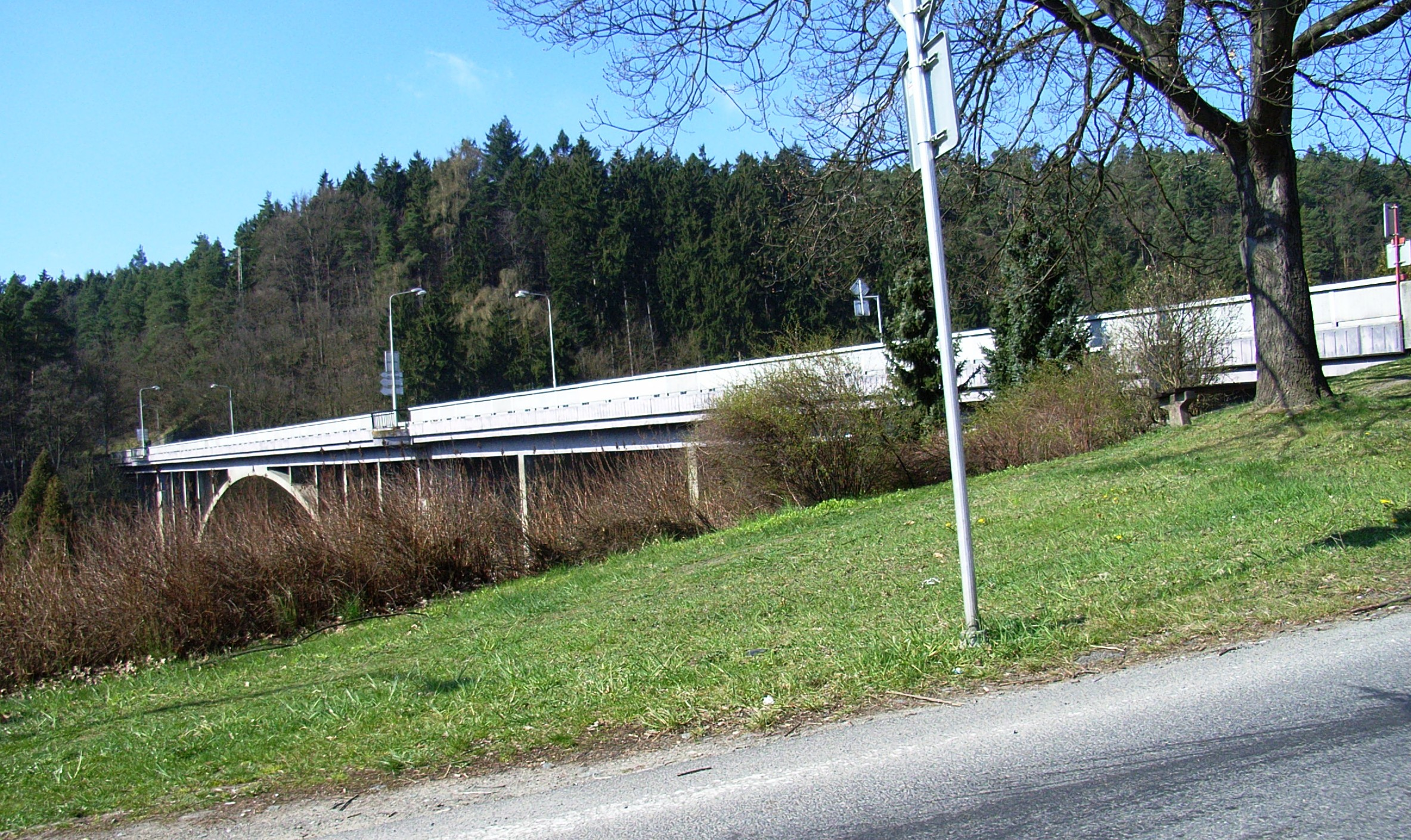 Silniční obloukový Švehlův most (z r. 1936) přes Lužnici v Táboře